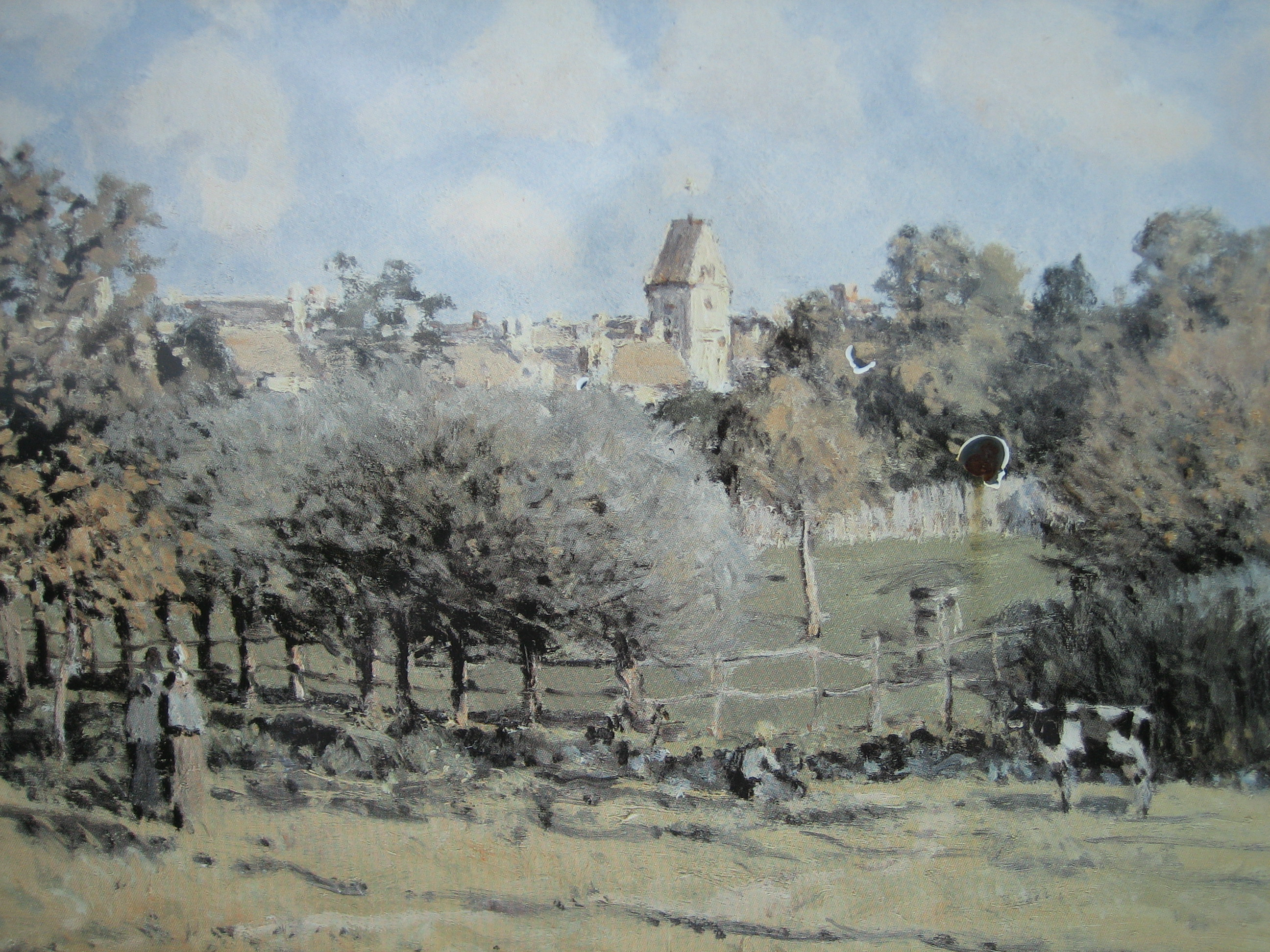 Noisy-le-Roi